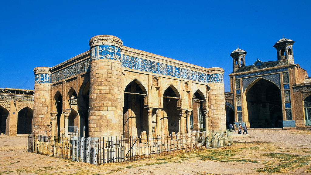 Hi-res version